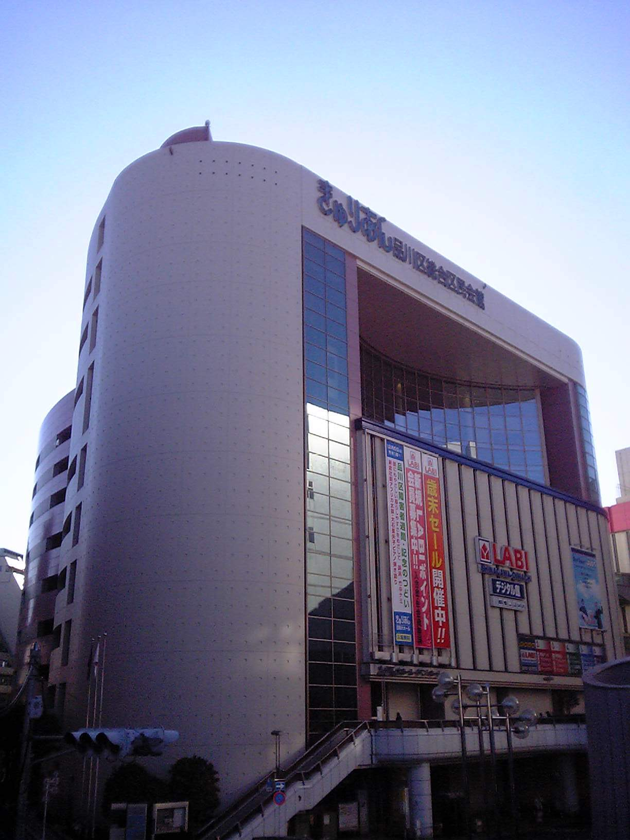 品川区立総合区民会館（愛称・きゅりあん）